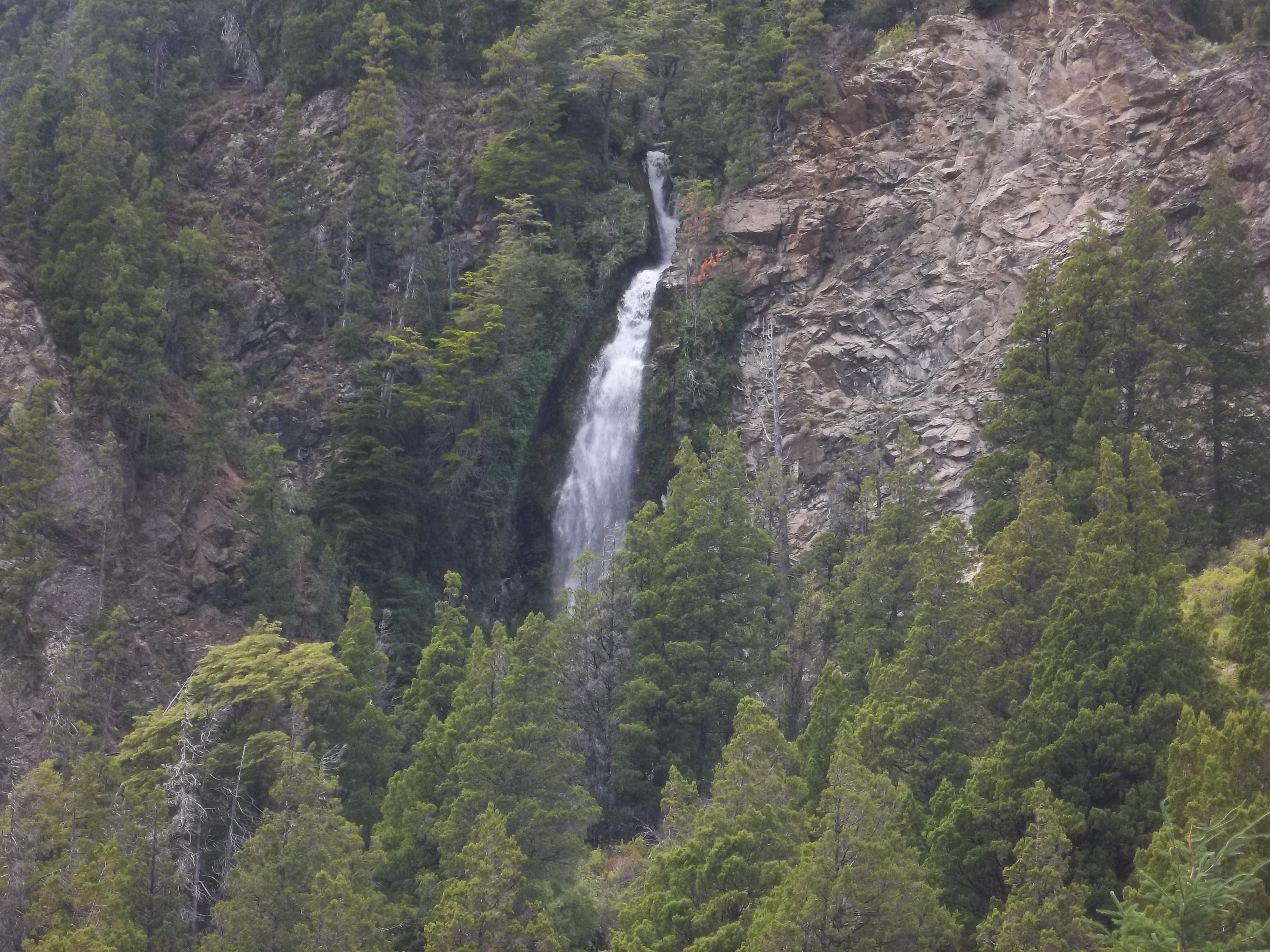 Cascada de la Virgen en el km 1935 de la Ruta Nacional 40, departamento Bariloche, provincia de Río Negro, Argentina.